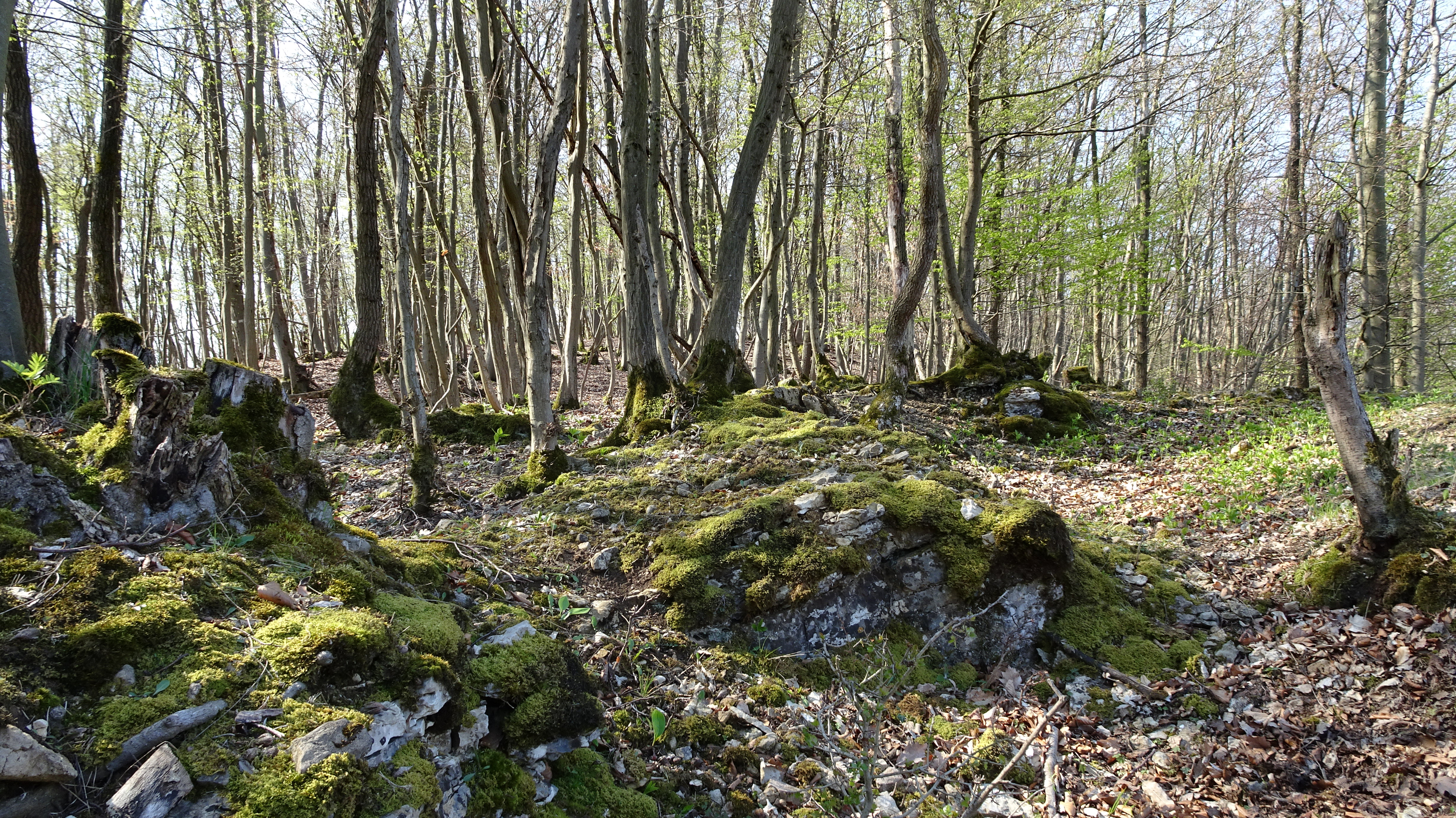 Der Trimberg bei Reichensachsen ist eine Bergkuppe im nordhessischen Werra-Meißner-Kreis, die sich mit einer Höhe von 332,6 m westlich und nördlich des Tals der Wehre erhebt. Die Vegetation besteht aus artenreichen Buchenwäldern, die in großen Teilen aus einer ehemaligen Niederwaldbewirtschaftung hervorgegangen sind. Um die im Gebiet des Trimberges lebenden seltenen Tierarten und die hier vorkommenden gefährdeten Pflanzenarten einschließlich ihrer Lebensräume und Standorte zu schützen wurde der Bereich im Dezember 1993 zum Naturschutzgebiet erklärt und später an die EU-Kommission als Flora-Fauna-Habitat-Gebiet für das länderübergreifende Schutzgebietssystems Natura 2000 gemeldet. Das Schutzgebiet liegt westlich des Ortsteils Reichensachsen und nördlich des Ortsteils Oetmannshausen der Gemeinde Wehretal.